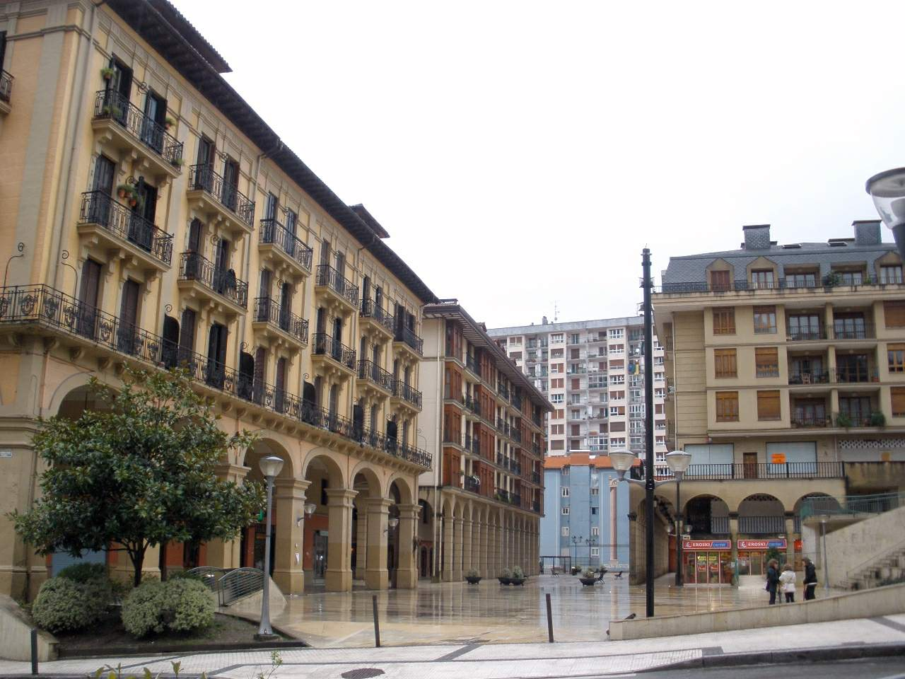 Urretxu (Gipuzkoa)